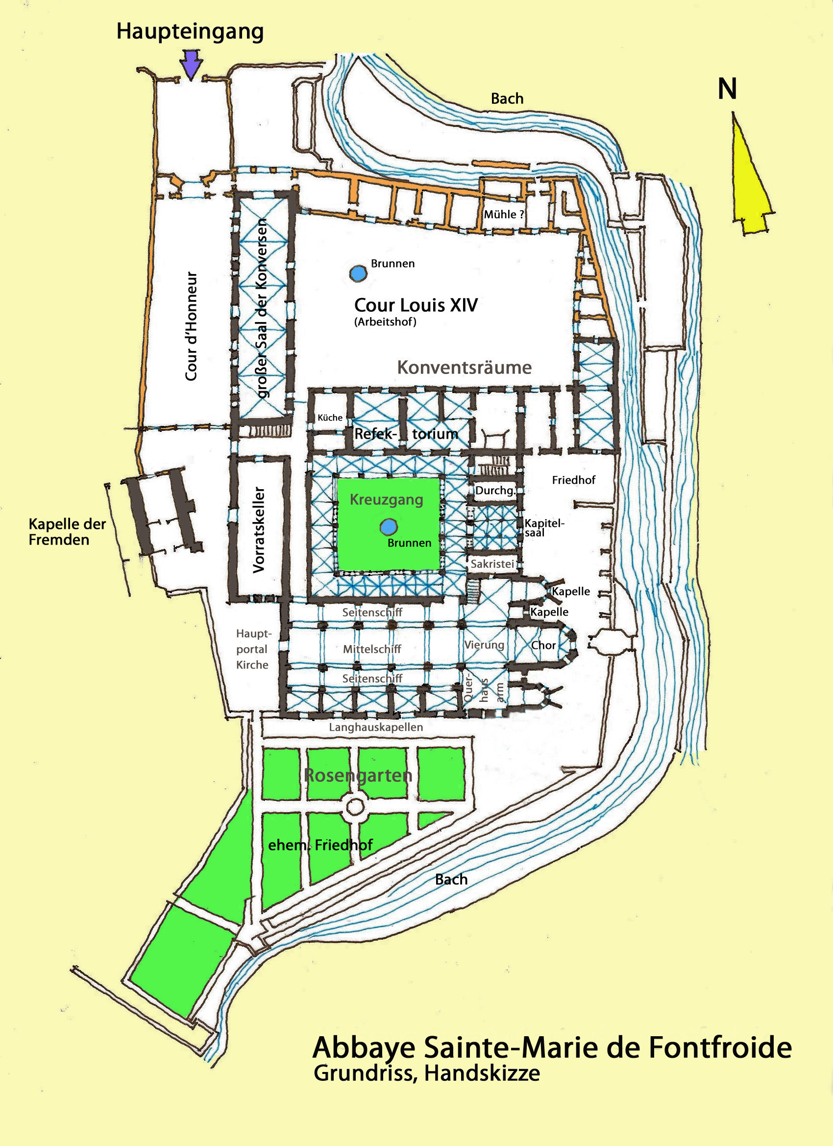 Abbaye de Fontfroide, Grundriss, Handskizze